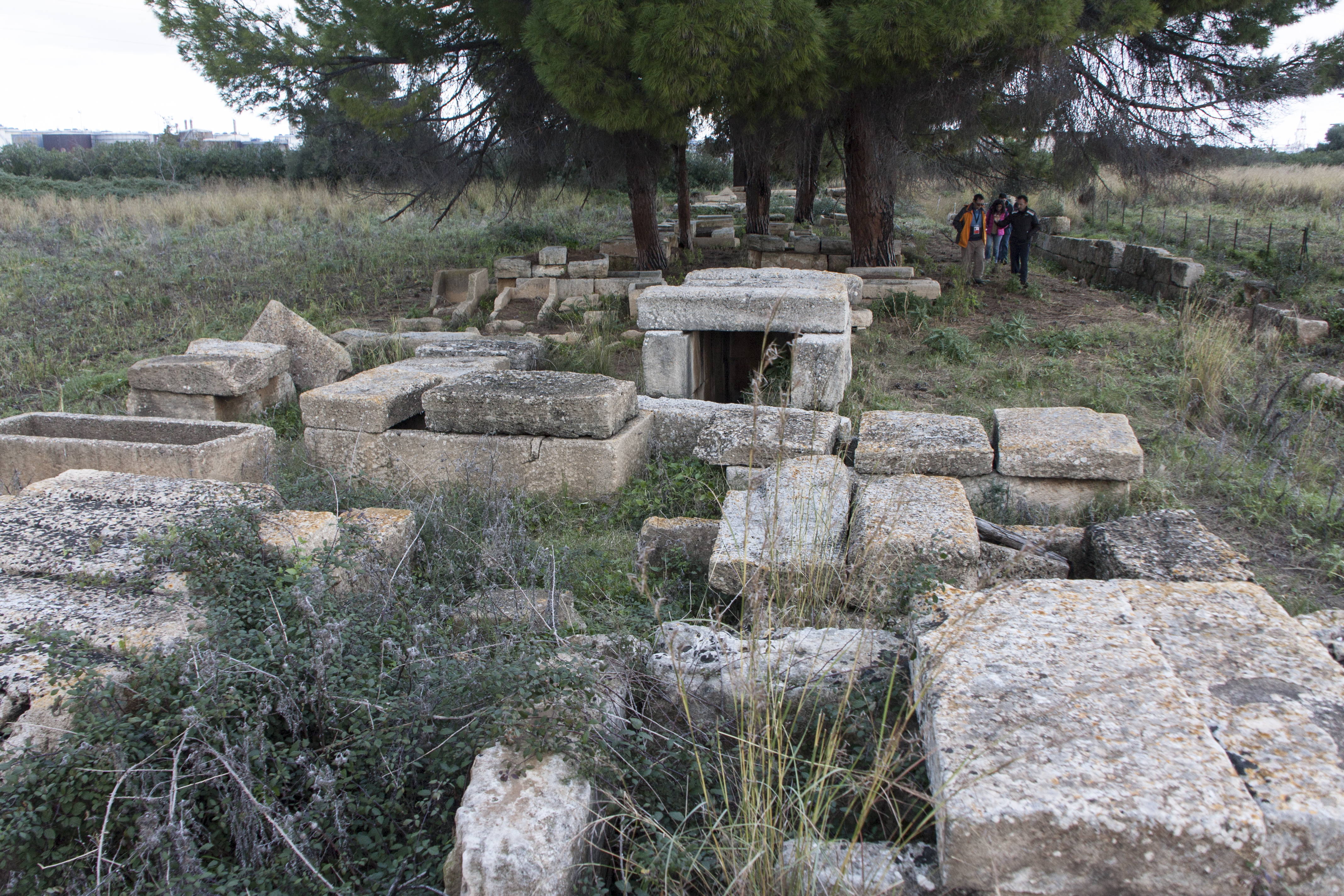 Necropoli di Megara Hyblaea